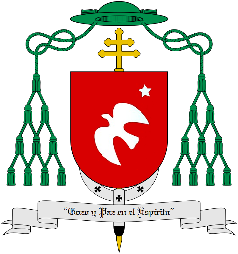 Escudo del Arzobispo de Córdoba